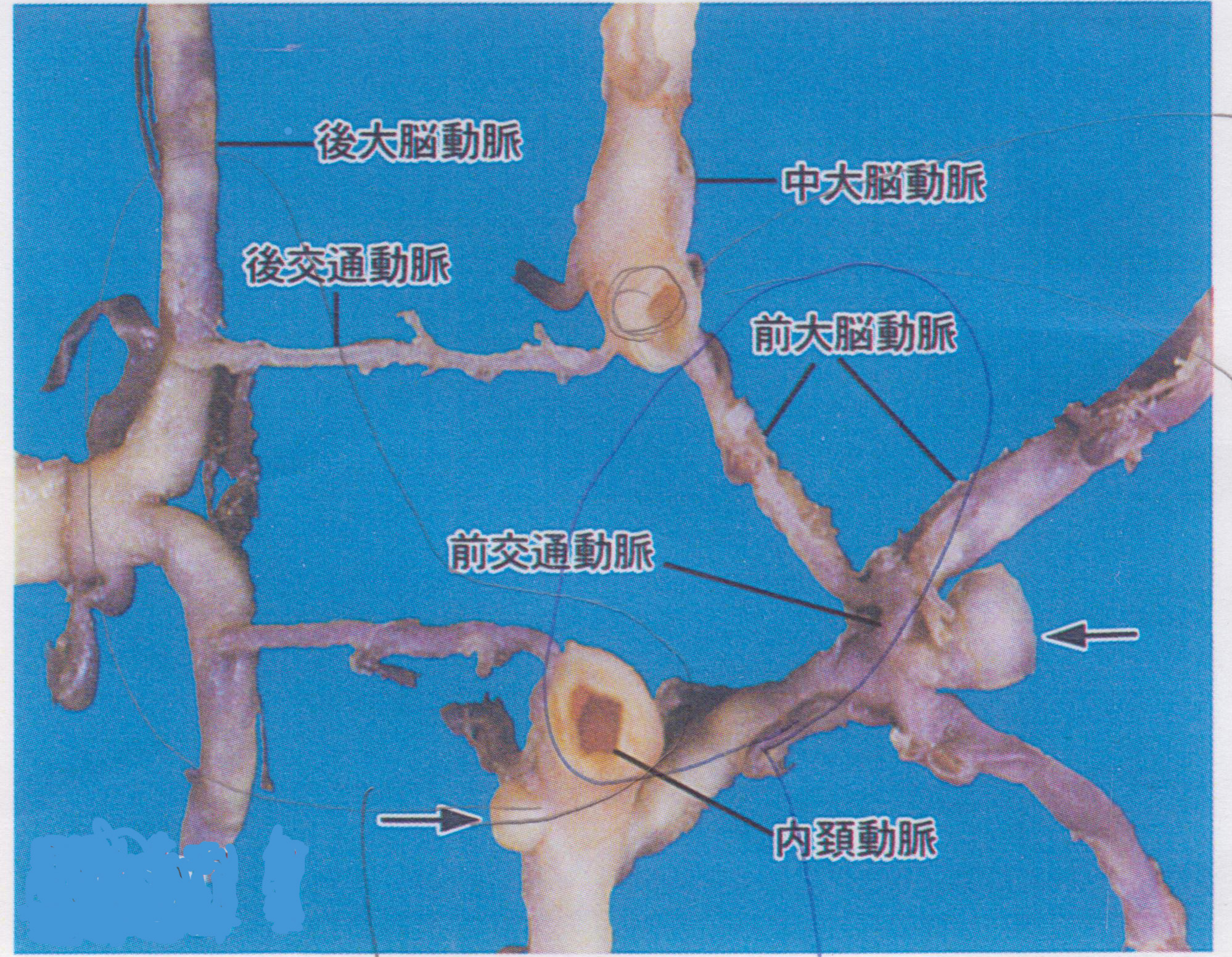 大動脈瘤で、大学の授業教材。おそらく直接撮影したもの。